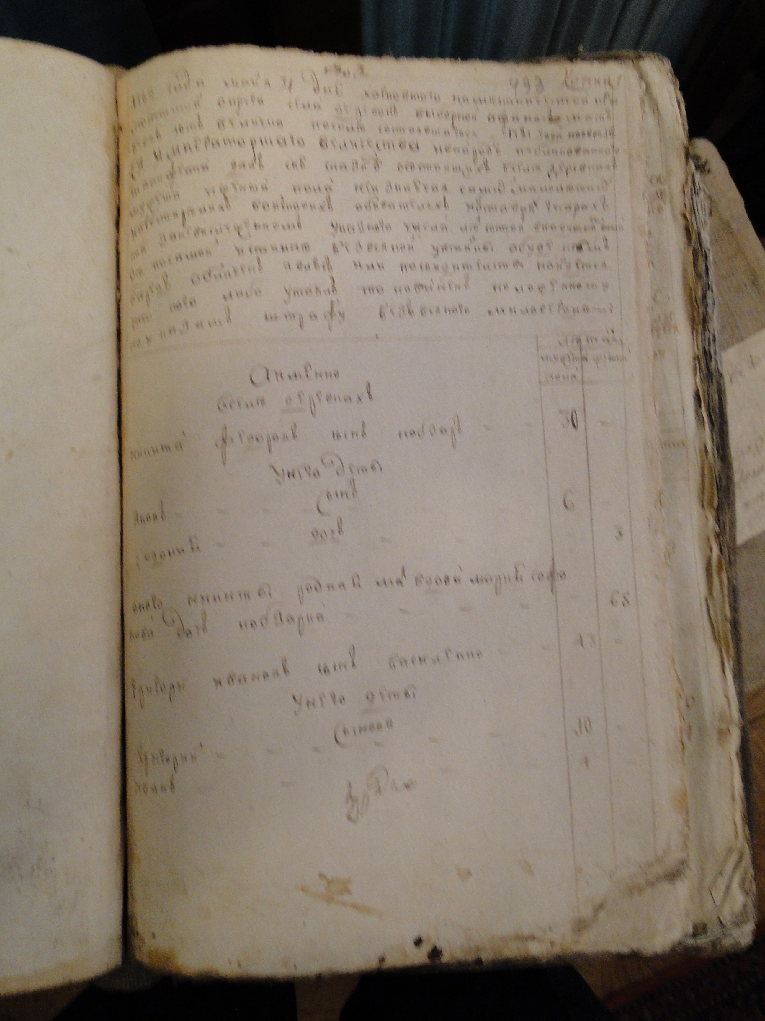 Ревізія с.Деревки (1782р.)